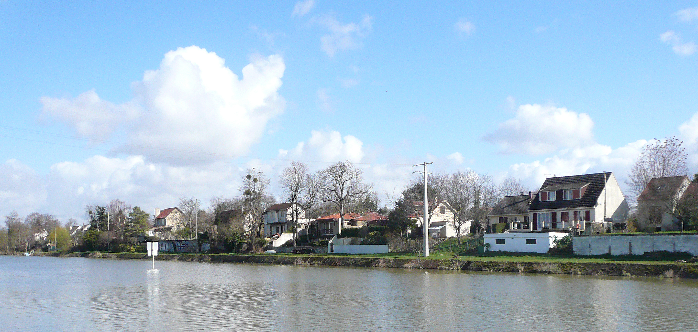 Ile de la Dérivation